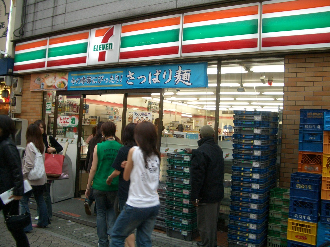 日本東京原宿竹下通7-Eleven。